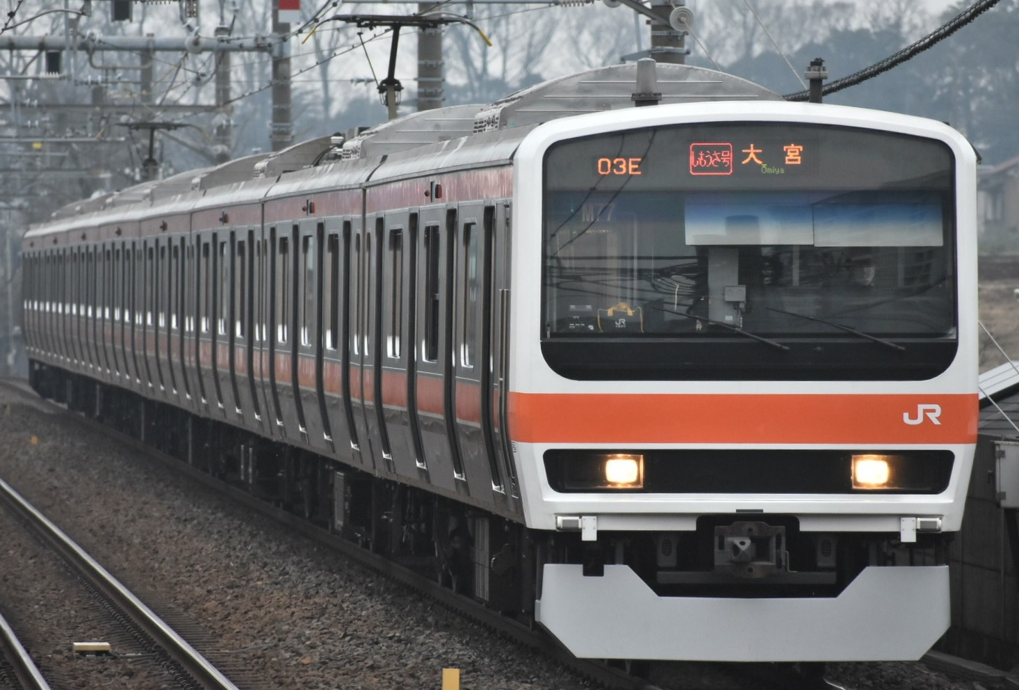 209系500番台千ケヨM77 @東松戸駅